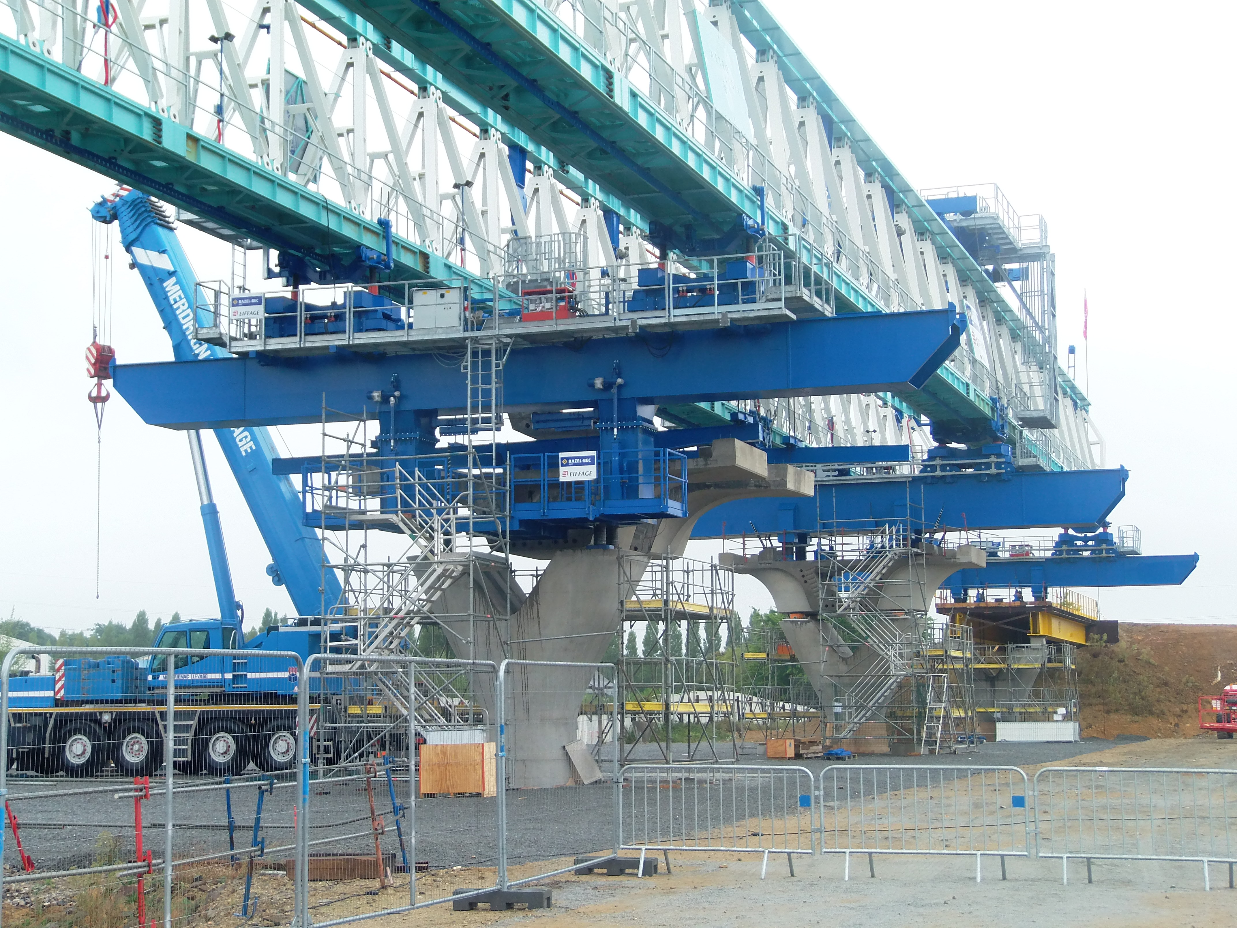 Photo prise lors des portes ouvertes du chantier du viaduc du métro ligne B, à Cesson ViaSilva.